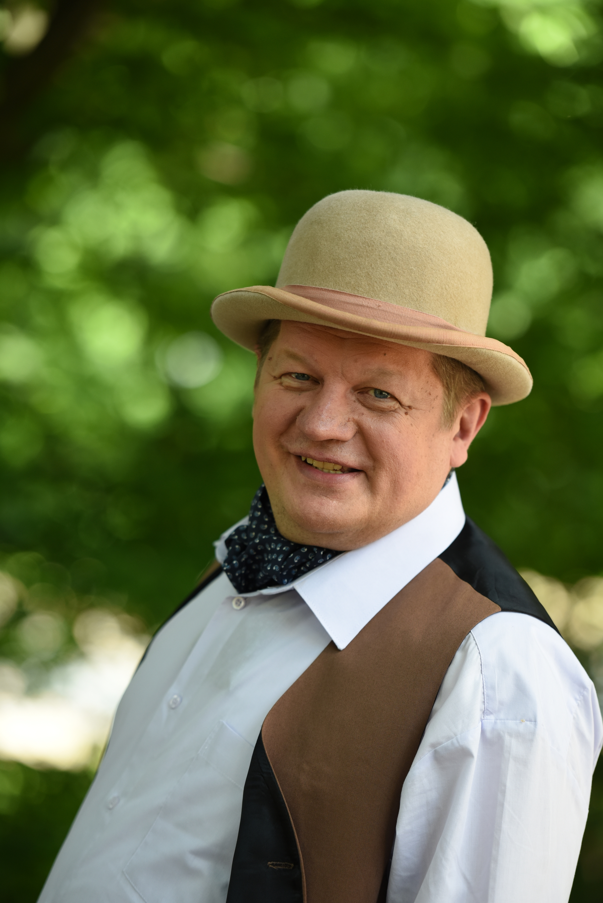 Janusz Krynicki - członek polskiego zespołu muzycznego Kapela Warszawska.